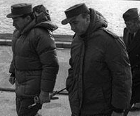 Generales de Brigada Mario Menéndez y Omar Parada.